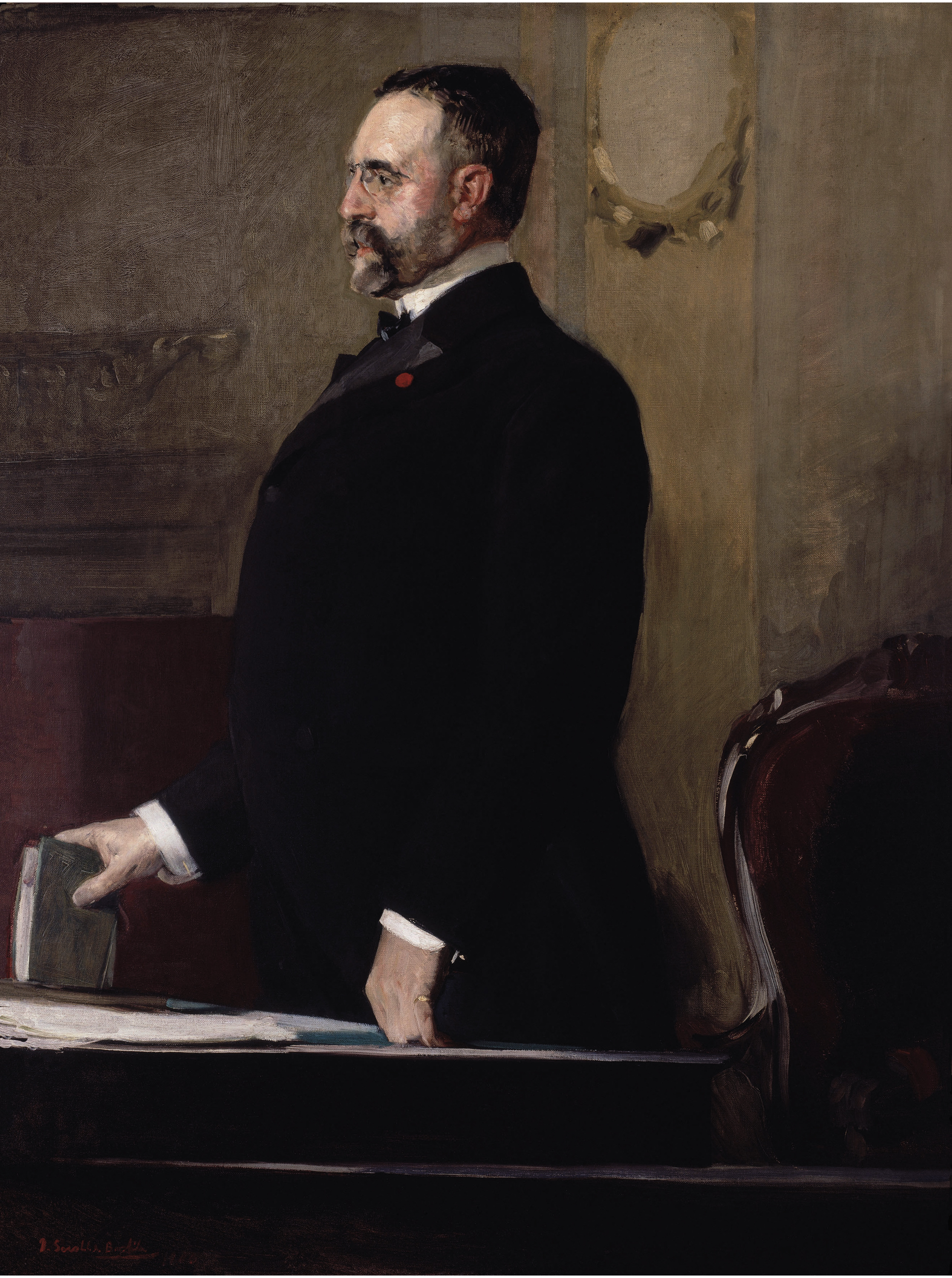 Retrato del politico español José Canalejas (1854-1912), que llegó a ser presidente del Consejo de Ministros de España durante el reinado de Alfonso XIII y murió asesinado por el anarquista Manuel Pardiñas Serrano en Madrid en 1912.